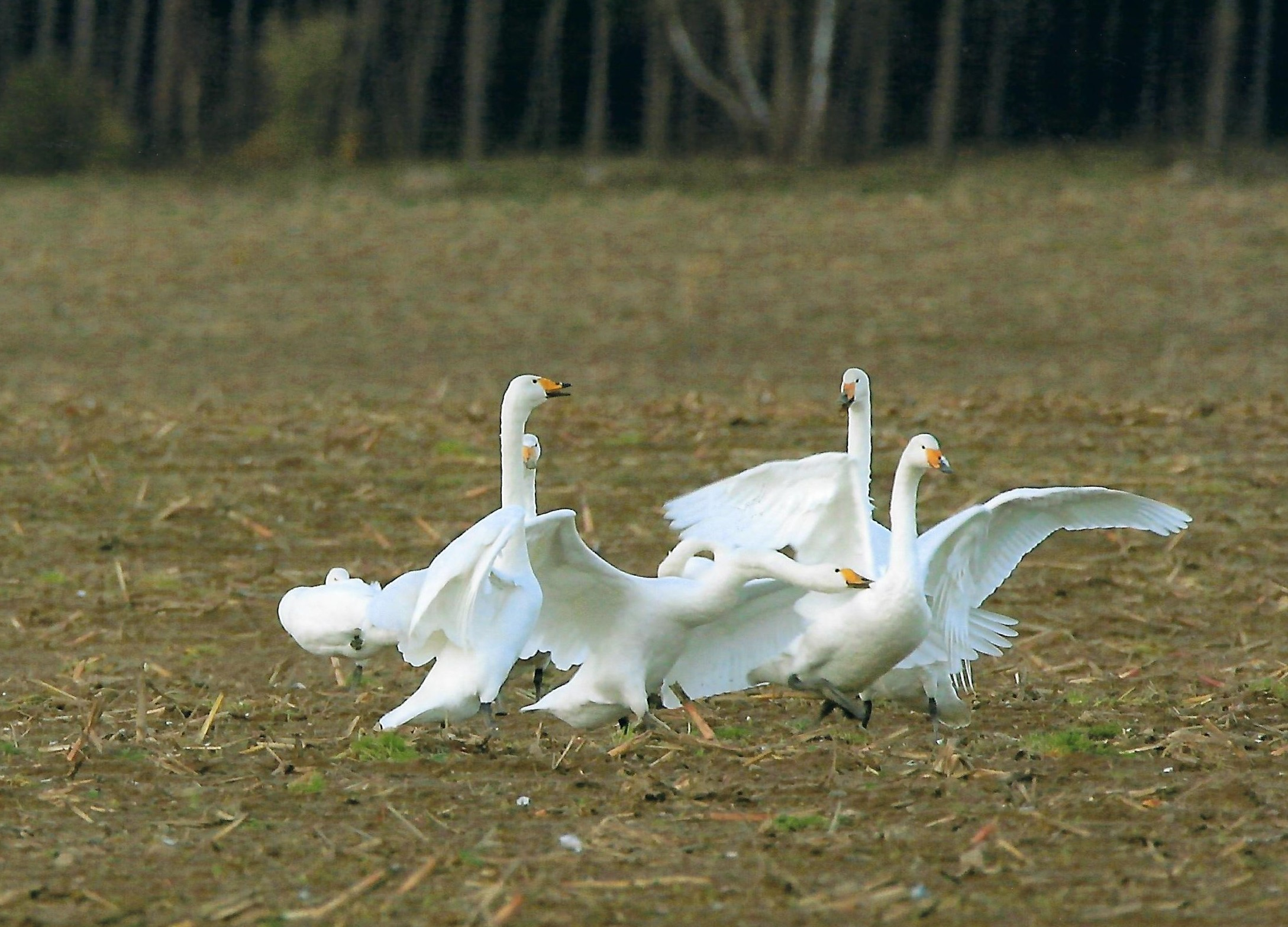 Singschwäne auf einem abgeerntetem Maisfeld in Mecklenburg